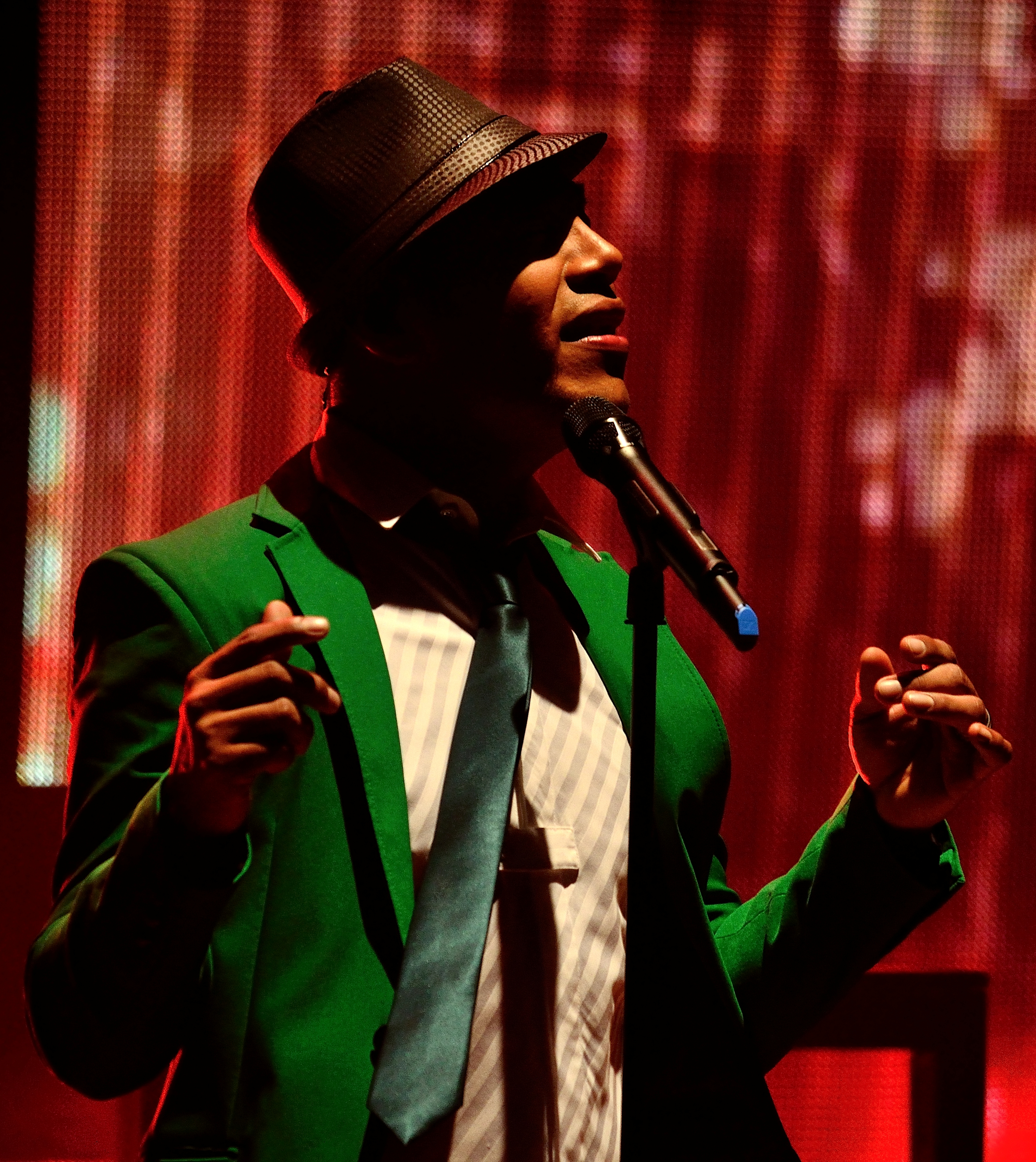 Samo durante el showcase otorgado en Centro Cultural Roberto Cantoral en la Ciudad de México como parte de la promoción de su álbum Inevitable.